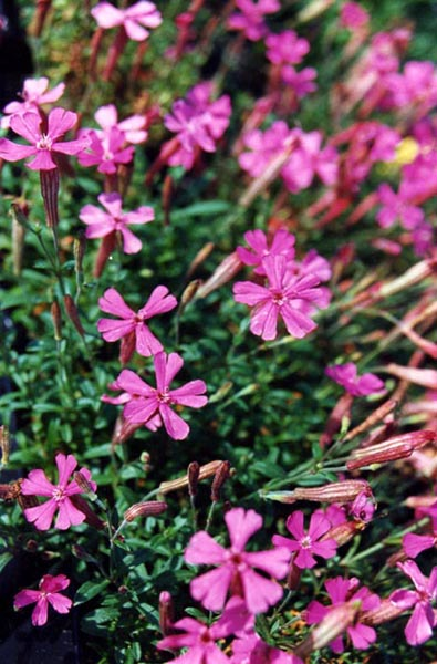 Silene shafta